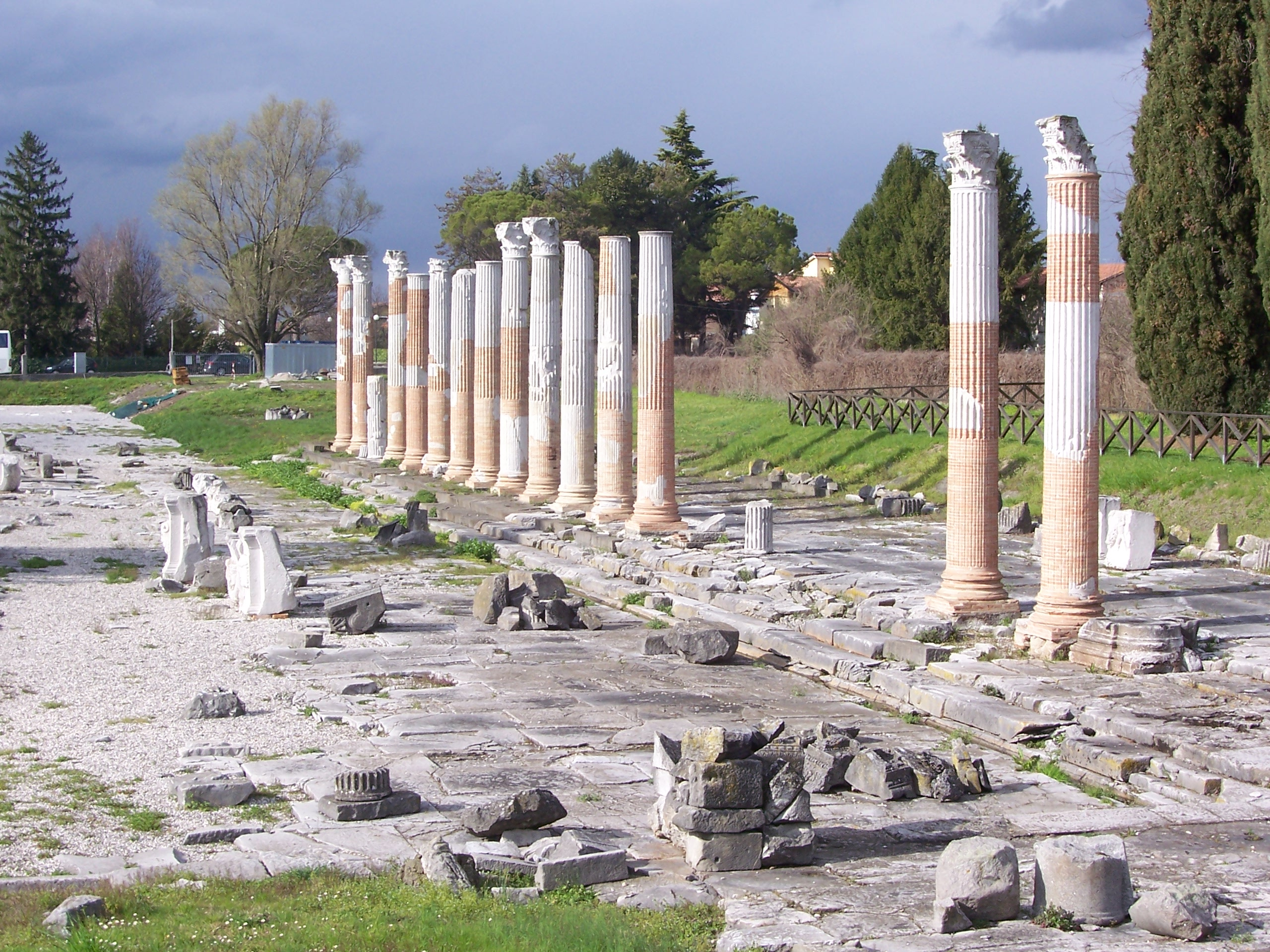 Foro romano di Aquileia